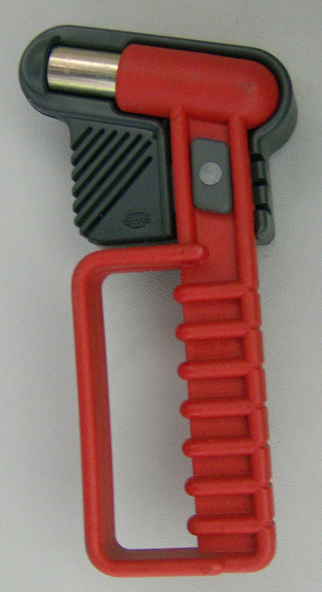 Notfallhammer